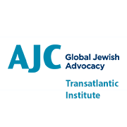 Offizielles Logo des AJC Transatlantic Institute